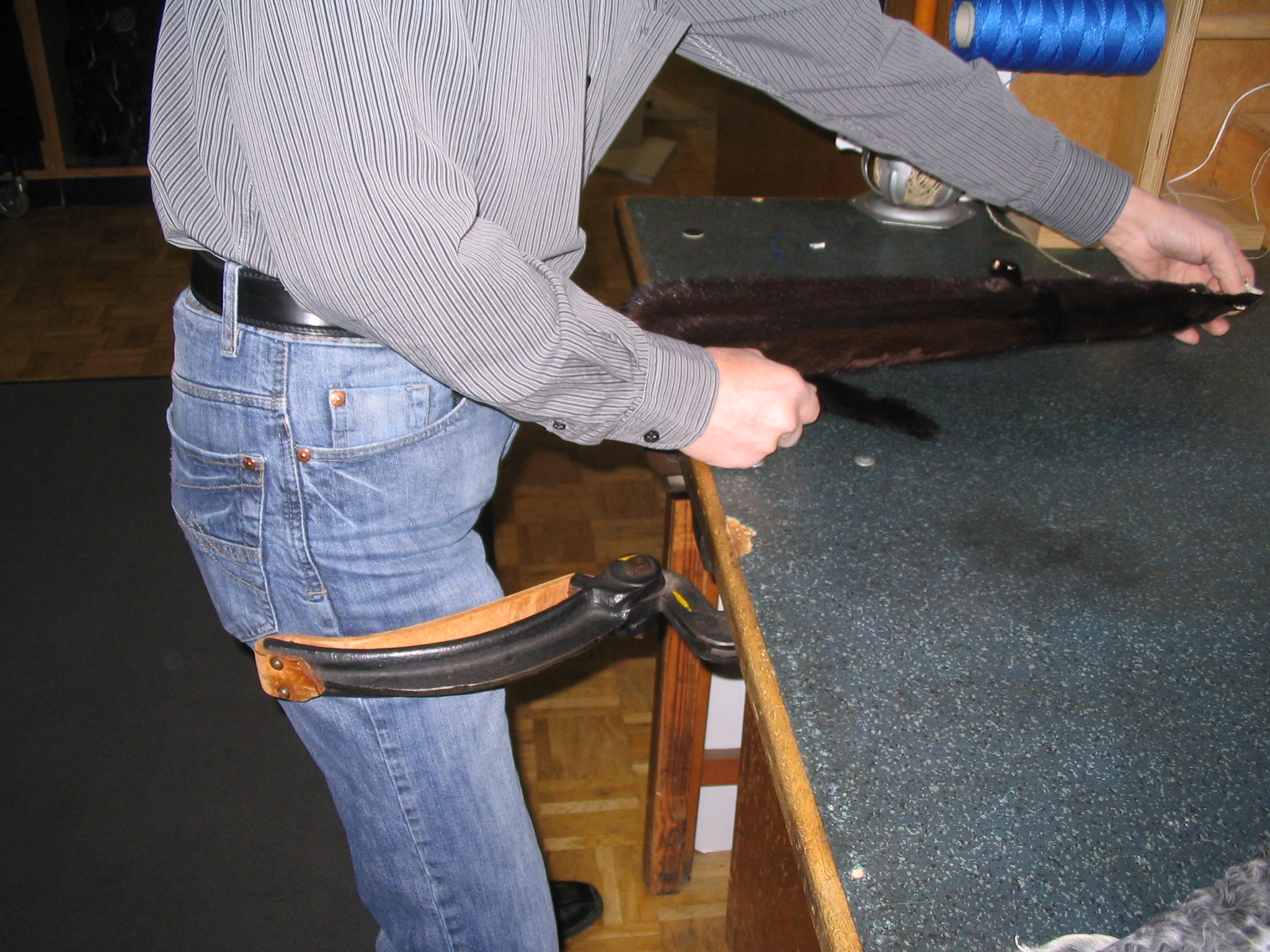 Gerät zum Breitstrecken von Pelzfellen bei einem Rauchwarenhändler in Frankfurt am Main. Typenschild: Build by „Reliable“. Made in U.S.A. Reliable Machine Works, Inc. Specializing in machinery for the fur industry. Brooklyn 22, N. Y.